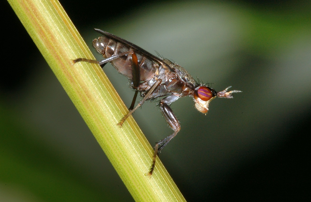 Sciomyzidae Coremacera marginata, Idstein, Hessen, Deutschland